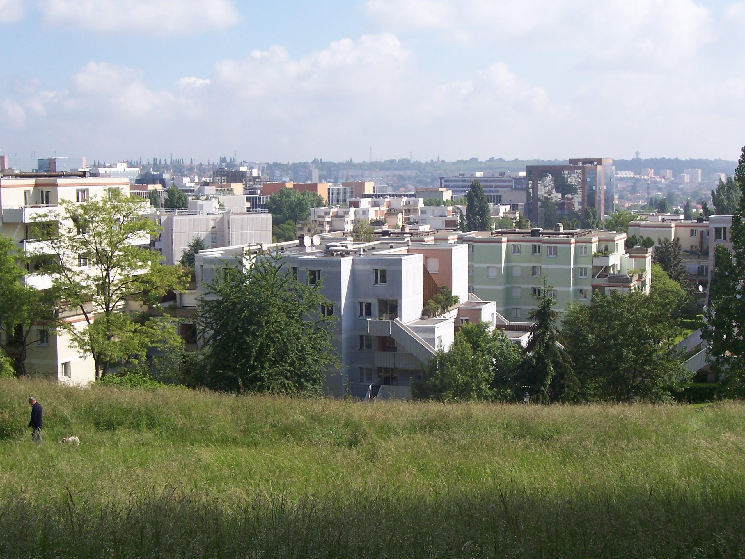 Le Bois Cadet